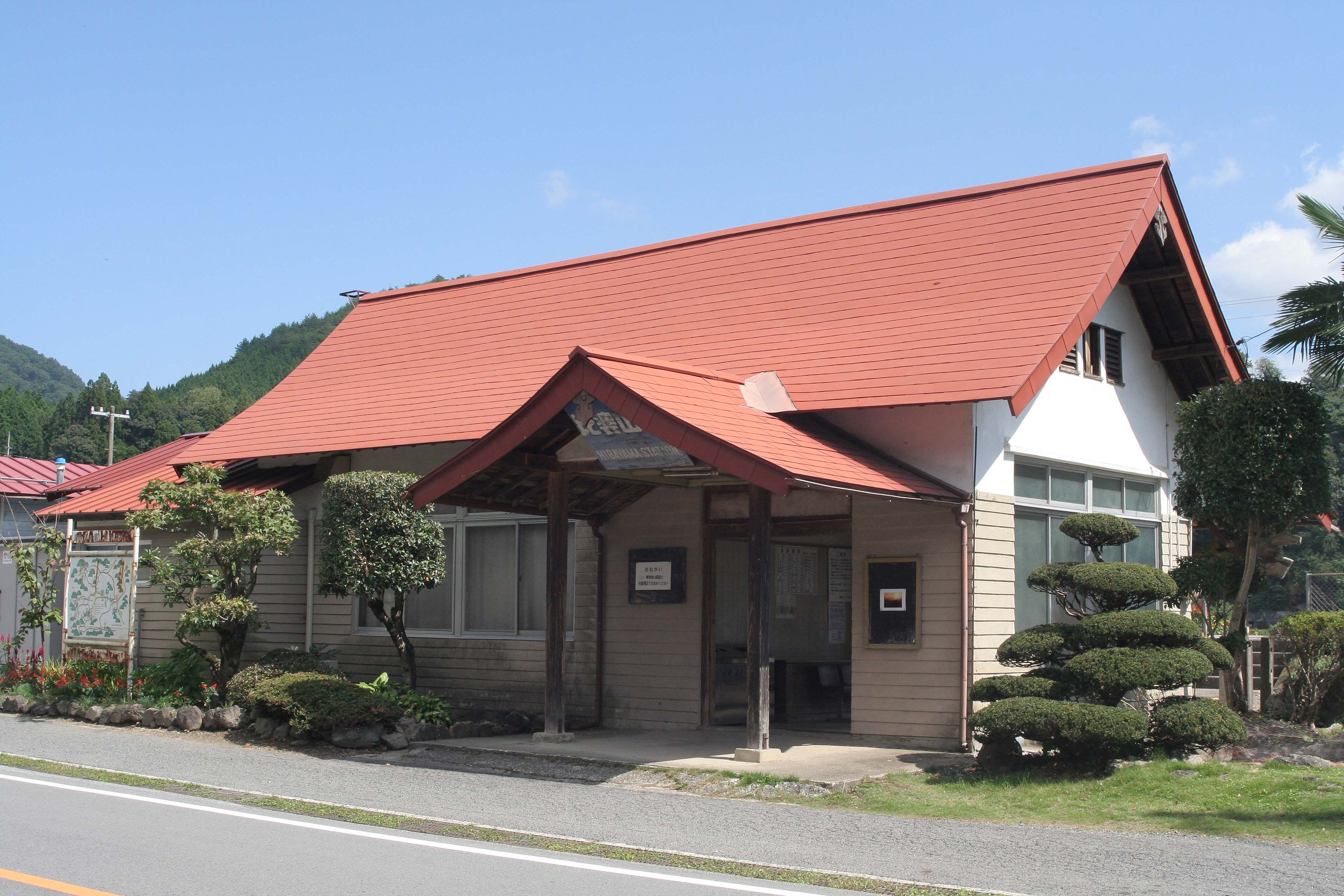 西日本旅客鉄道 比婆山駅の駅舎